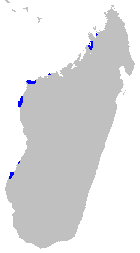 Madagascar mangroves ecoregion map